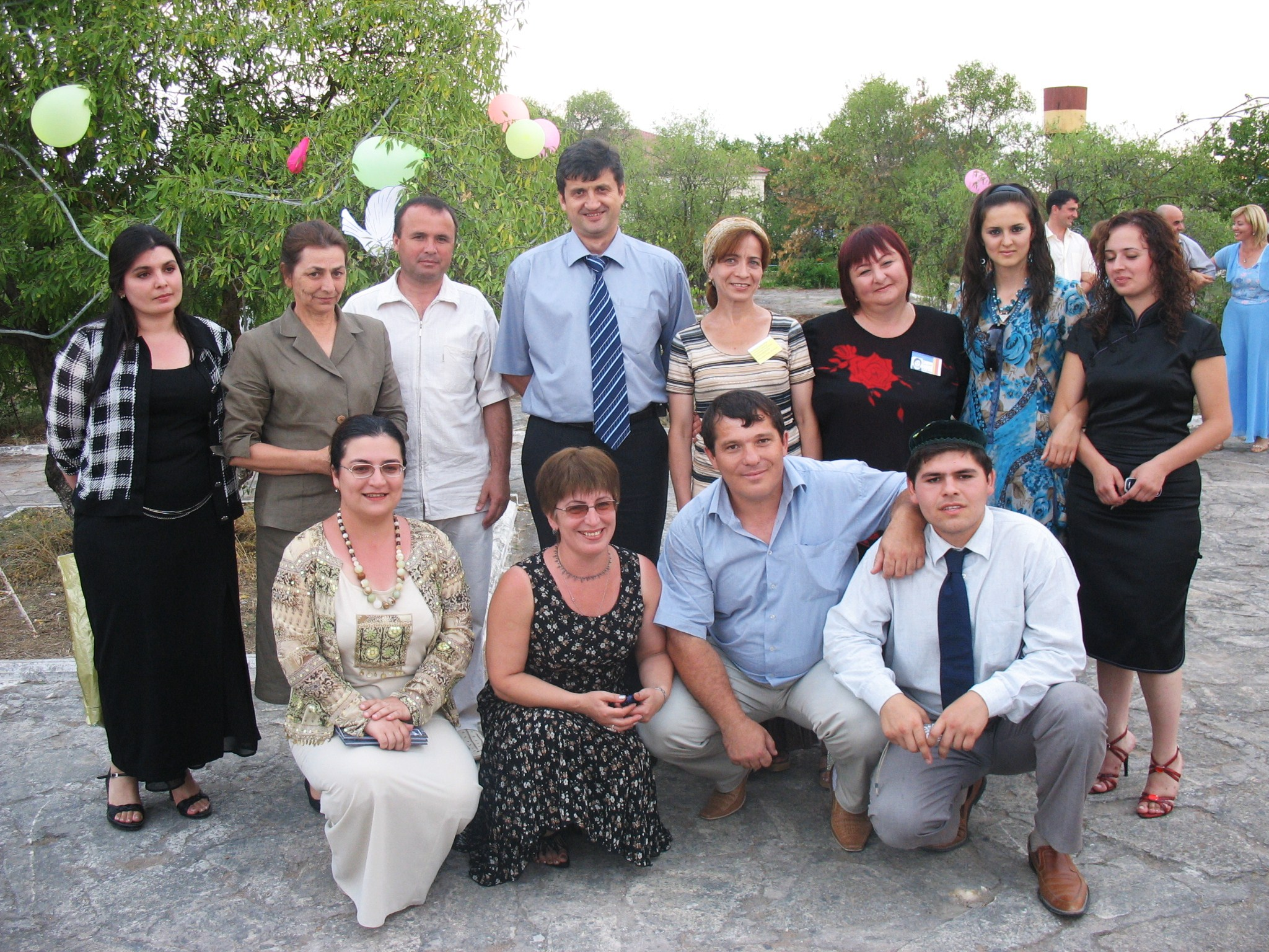 Детский миротворческий лагерь Плюс (июль, 2006)